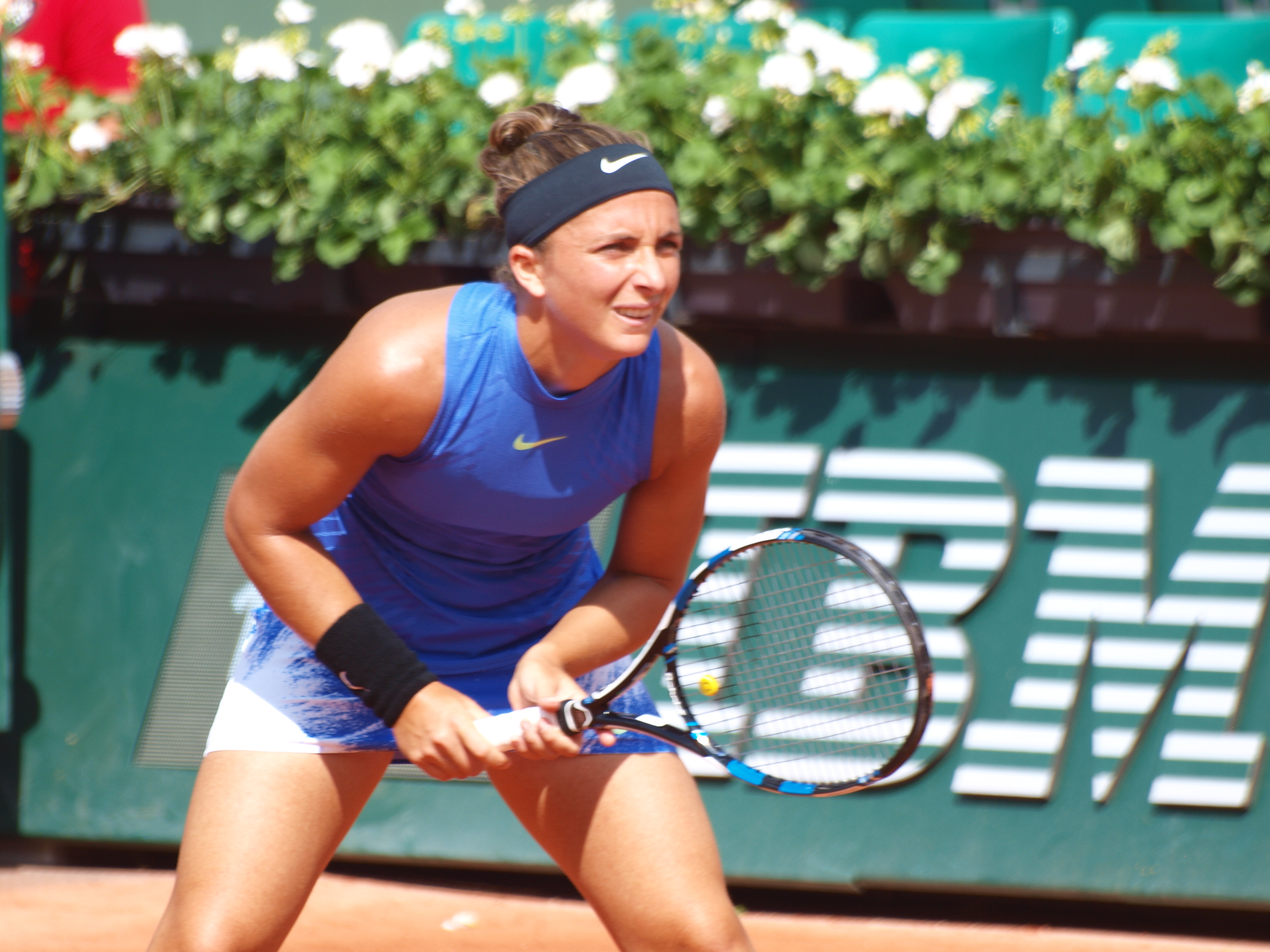 Sara Errani aux Internationaux de tennis de Roland Garros, le 31 mai 2017, dans son match contre Kristina Mladenovic.